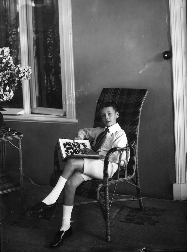 Набоков, Владимир Владимирович